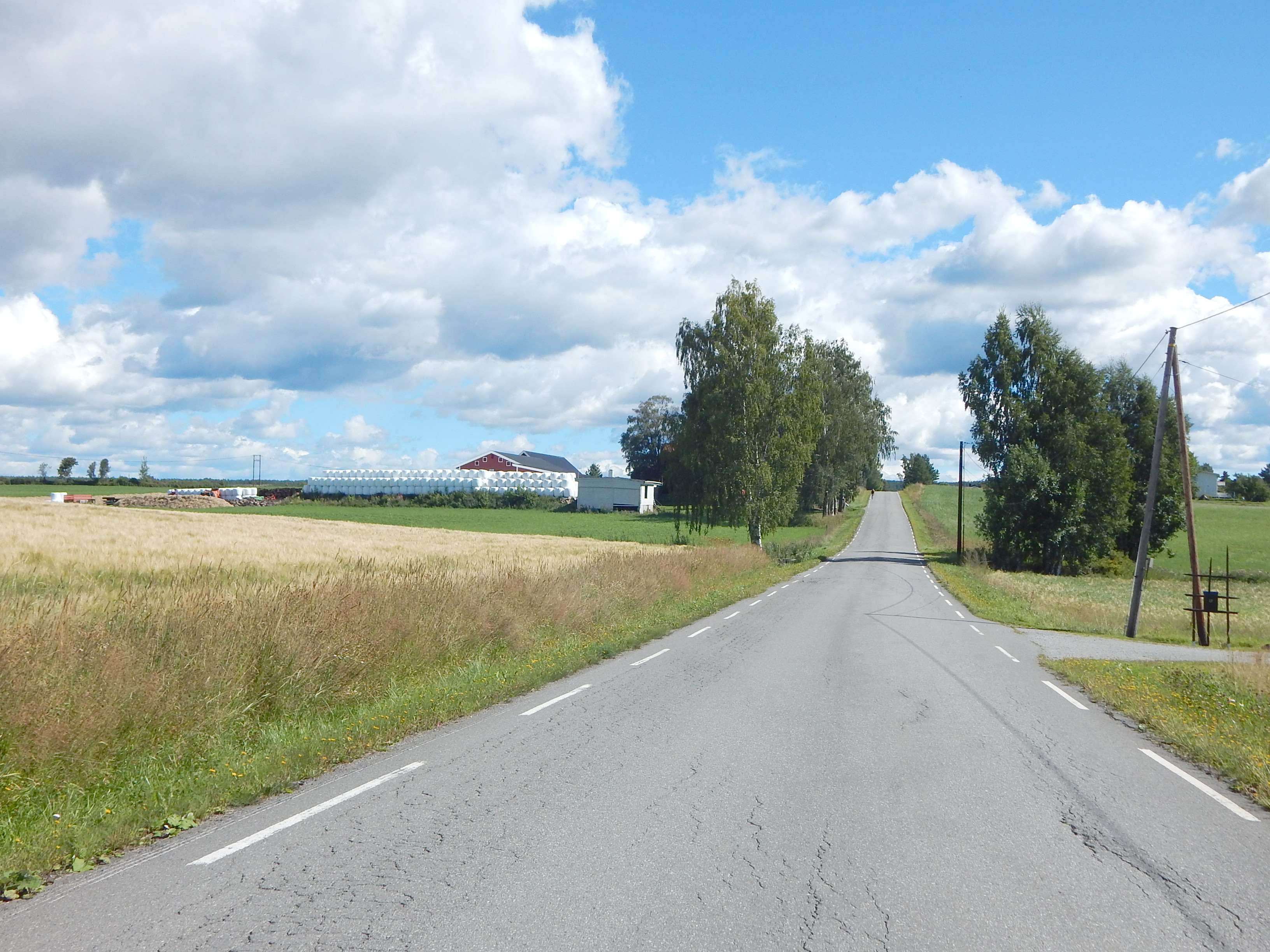 Åsvegen (fylkesvei 1916, tidl. 239) østover mot Norderhaug